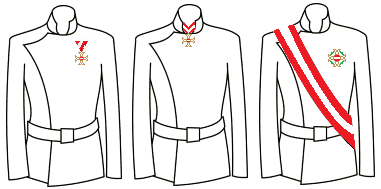 Modo di indossare le decorazioni dell'Ordine Militare di Maria Teresa (Impero Austriaco)